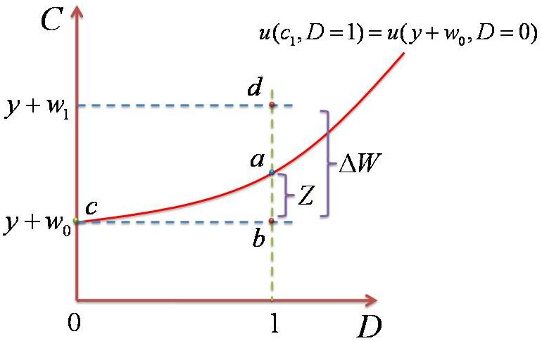 Relacion entre las amenidades y el nivel de consumo, incluyendo la crva de indiferencia.